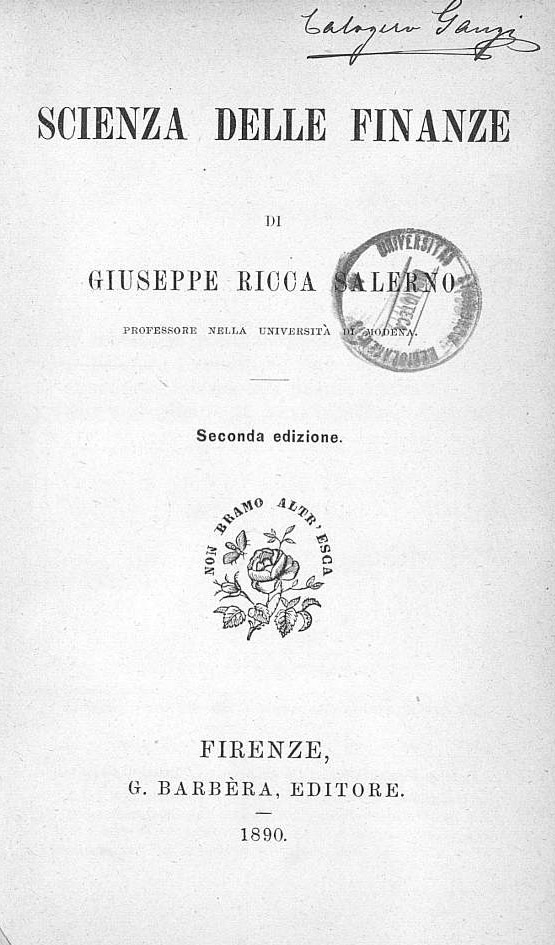 Frontespizio